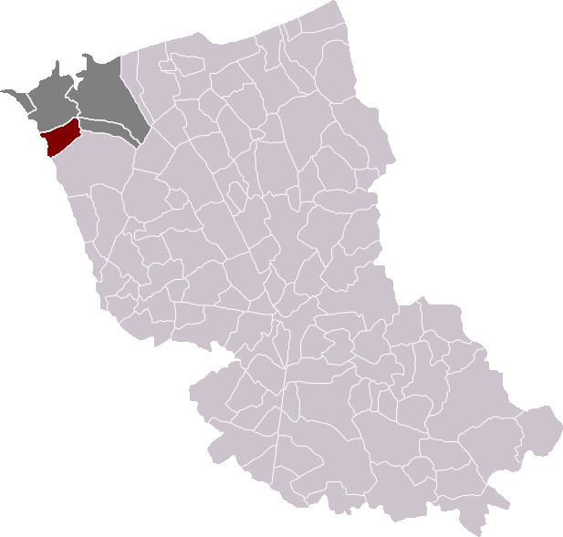 Locatie gemeente Sint-Joris in arrondissement Duinkerke. Zelfgemaakt. Location of Saint-Georges-sur-l'Aa municipality in the arrondissement of Dunkirk. Self made. Localisation de la commune de Saint-Georges-sur-l'Aa dans l'arrondissement de Dunkerque. Fait moi-même.